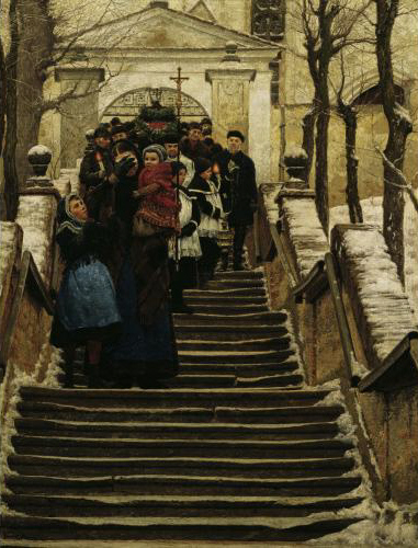 Winterlabel QS:Len,"Winter" label QS:Lde,"Winter" label QS:Lfr,"Hiver"